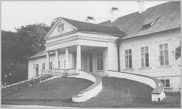 Беларуская (тарашкевіца): Гародна (Harodna), сядзіба Тышкевічаў (Tyškievič)